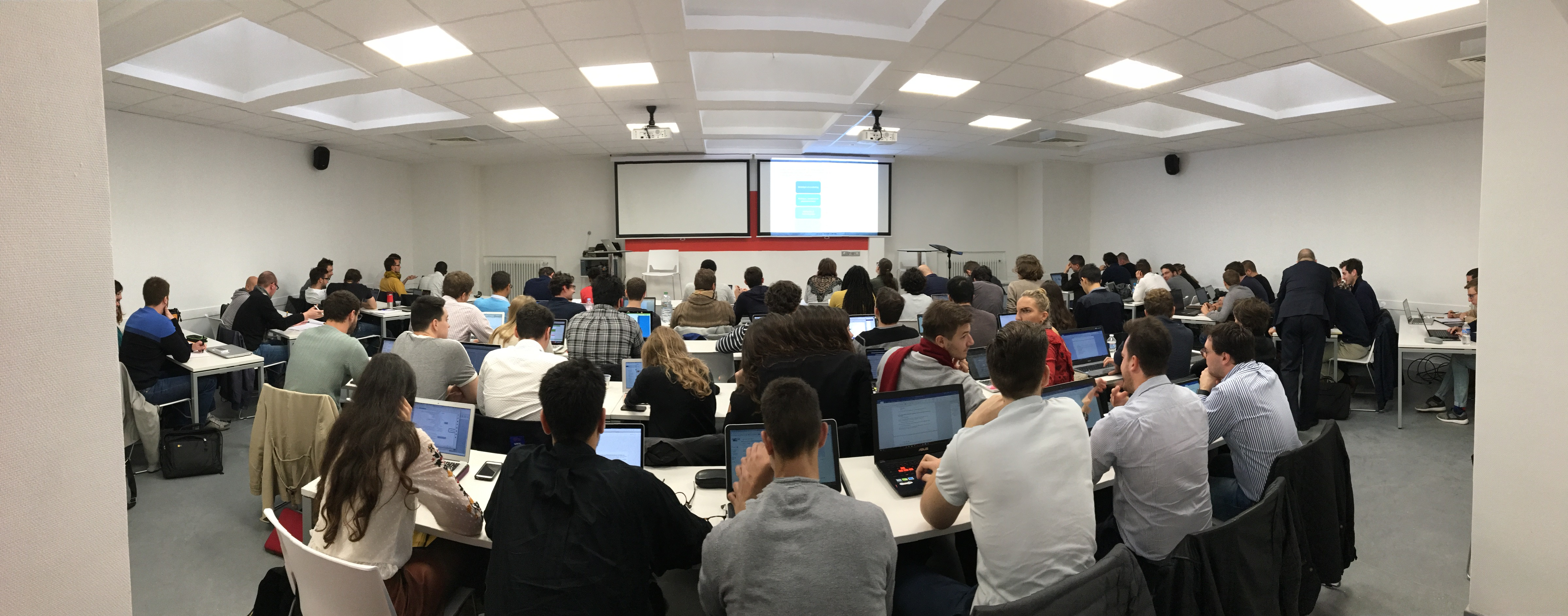 Amphithéatre Pichot Duclos de l'Ecole de Guerre Economique